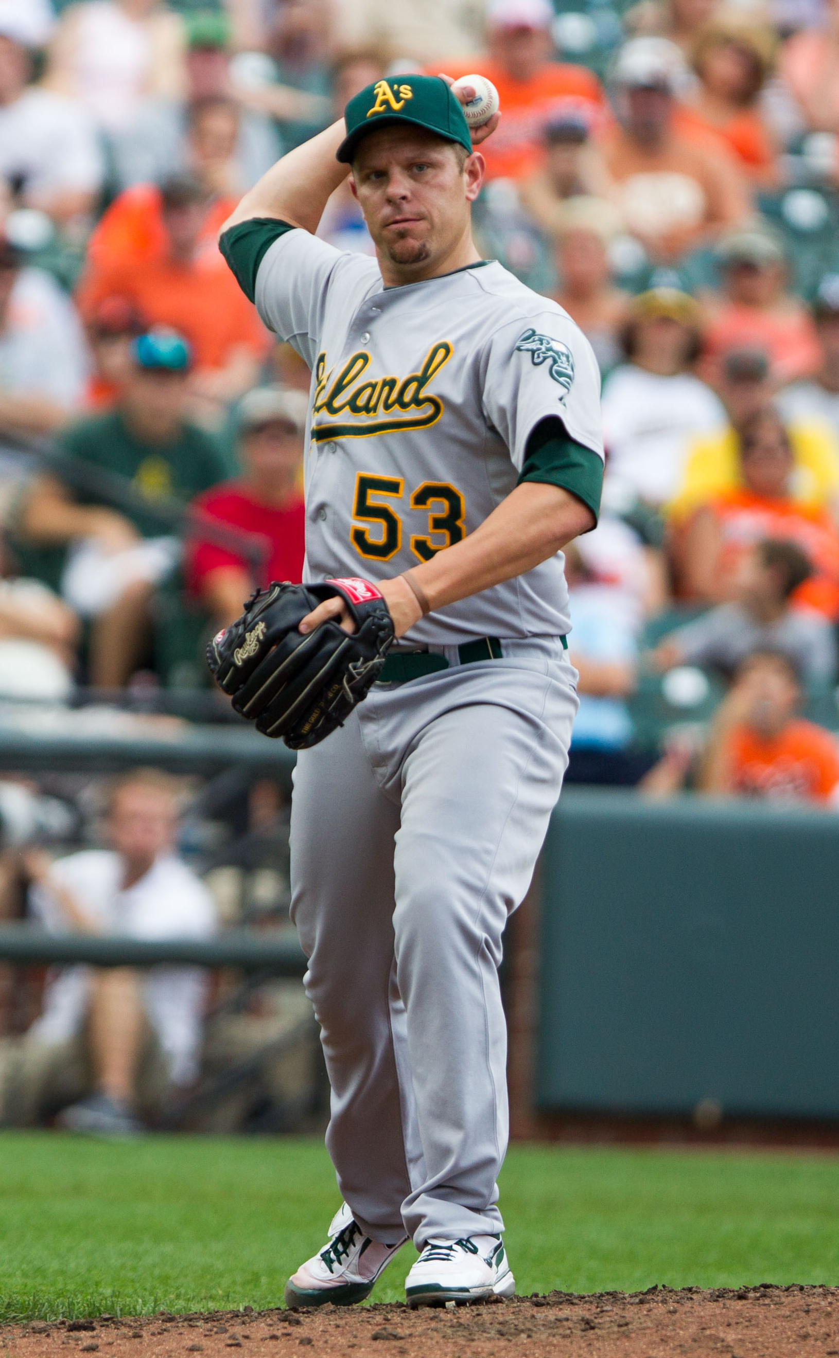 Jim Miller